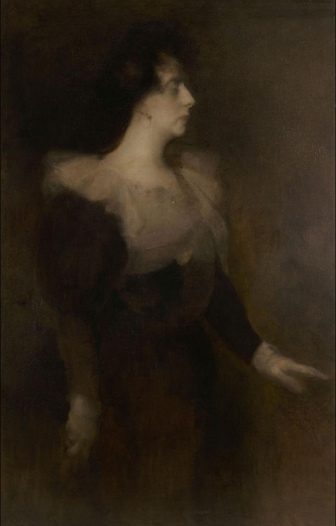 Portrait de Pauline Ménard-Dorian, par Eugène Carrière, vers 1890.